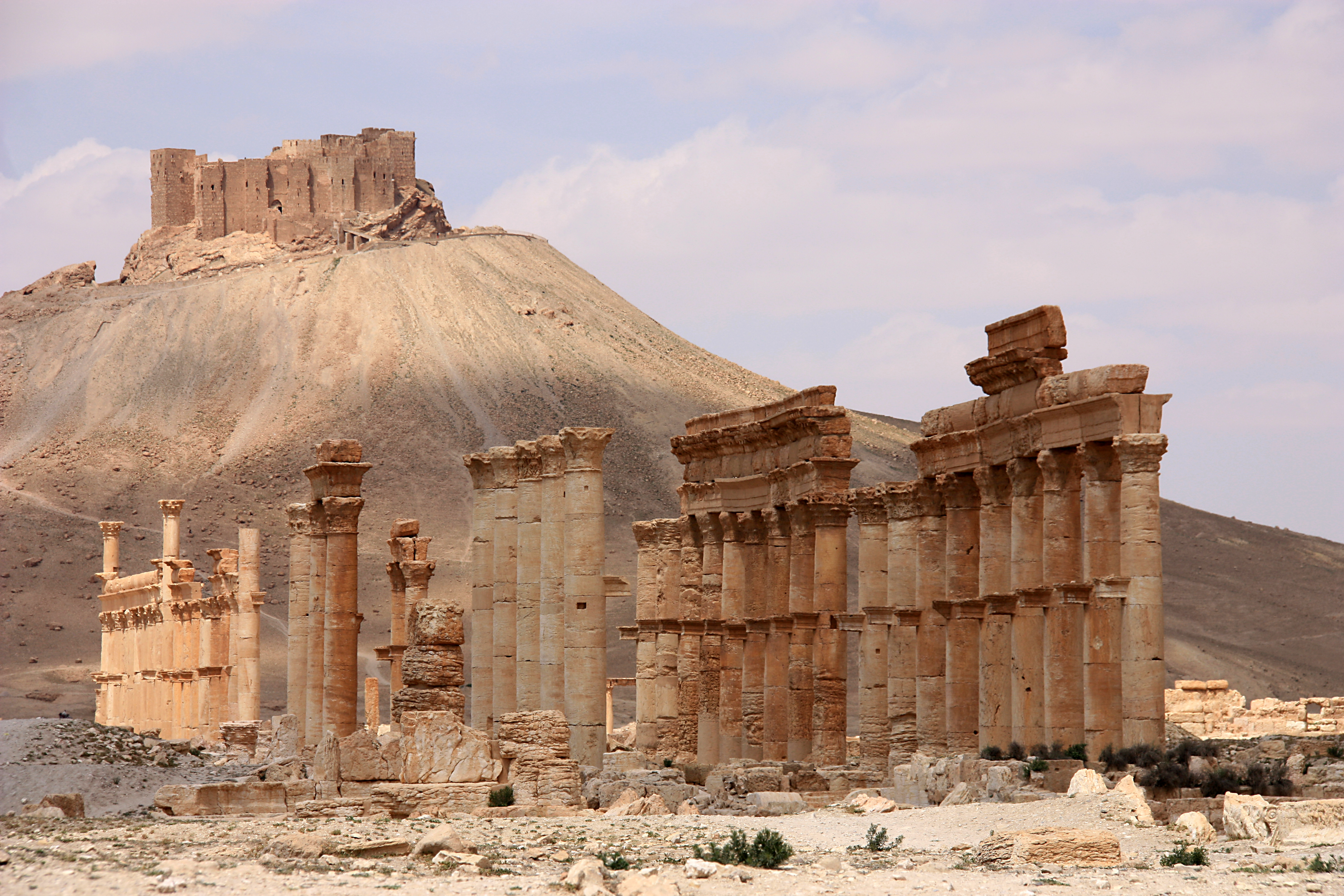 Blick von Teilen der Ruinenstadt Palmyra auf die arabische Zitadelle